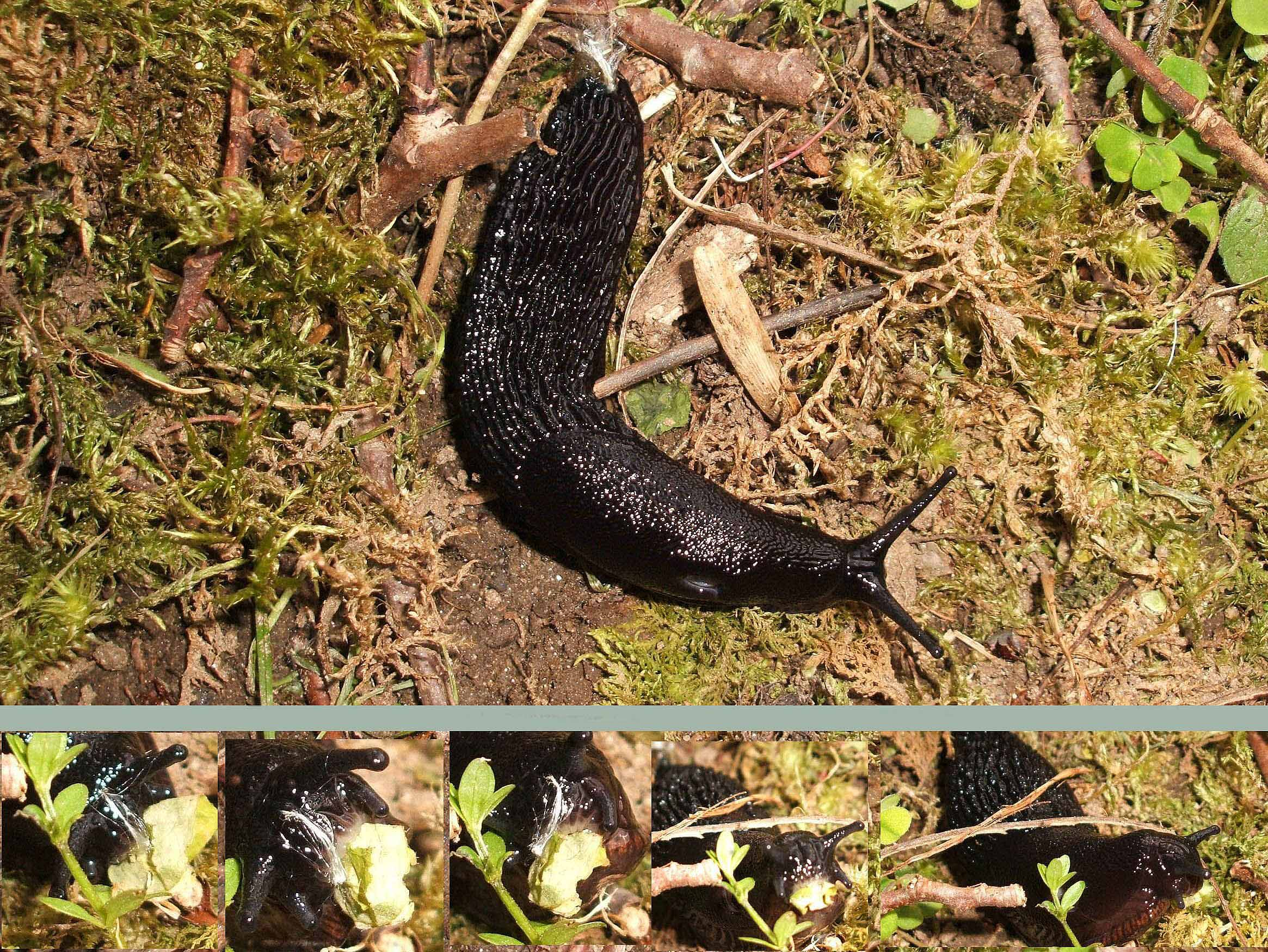 Here you see the Arion ater black eating a leaf he found on the ground. Norwegian: Ein liten bildeserie av ein svart skogssnegl som et eit lite blad den fann på marka.Vanleg størrelse på denne på desse sneglane er rundt 8-10 cm, men kan bli opptil 15 cm.